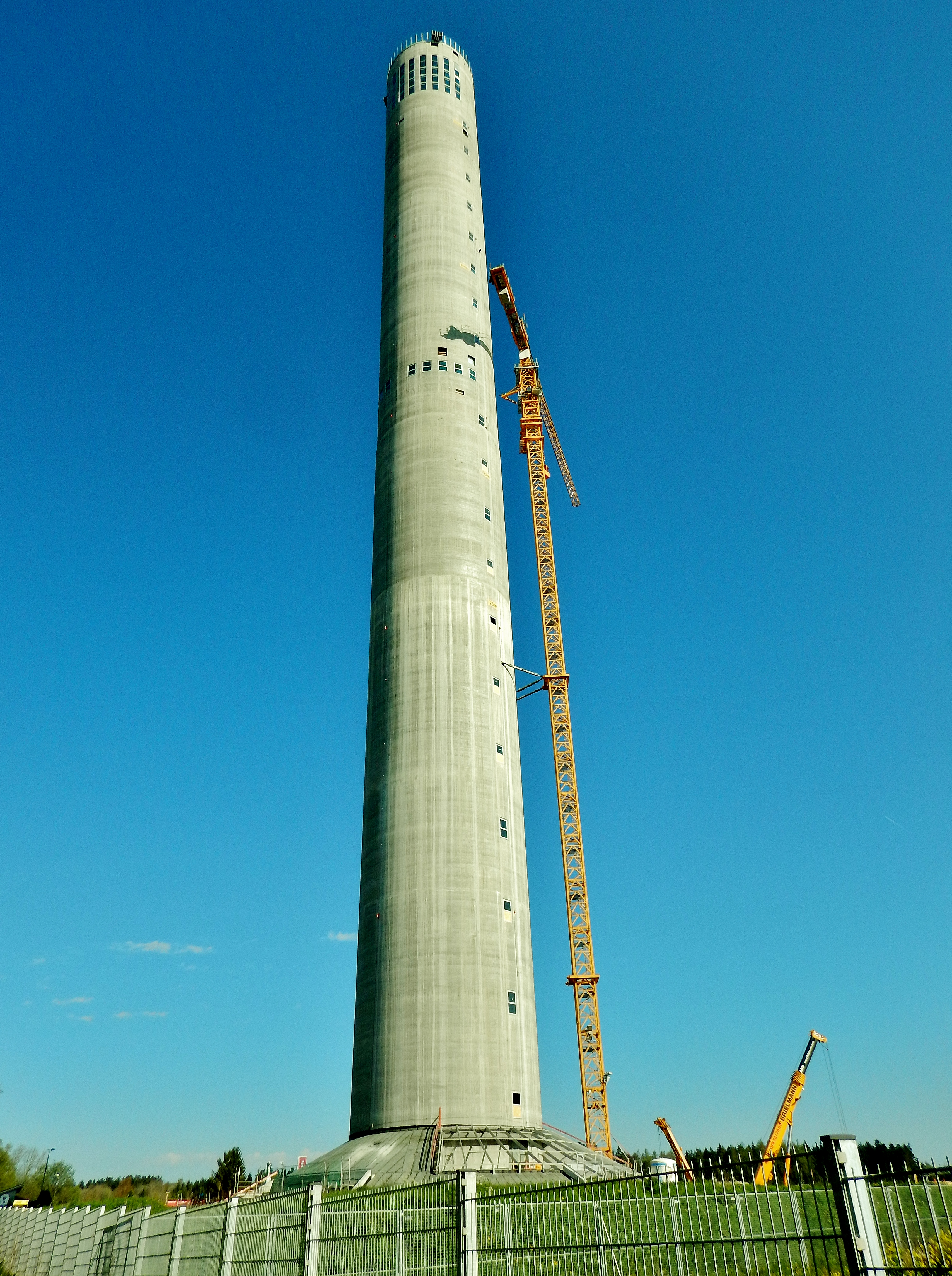 Aufzugstestturm der ThyssenKrupp Elevator AG